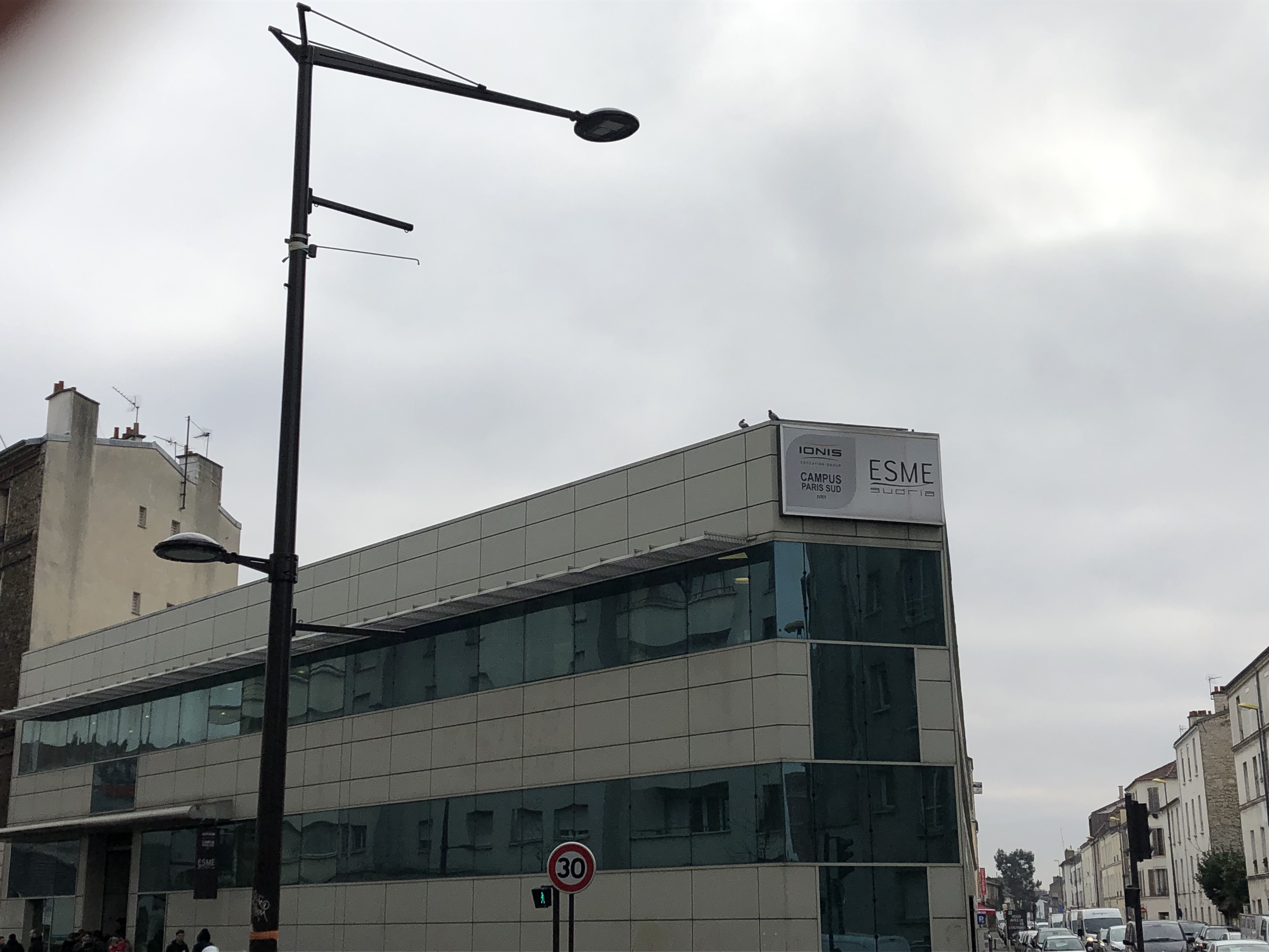 Campus Paris Ivry-sur-Seine de l'Ecole d'ingénieurs ESME Sudria, rue Molière